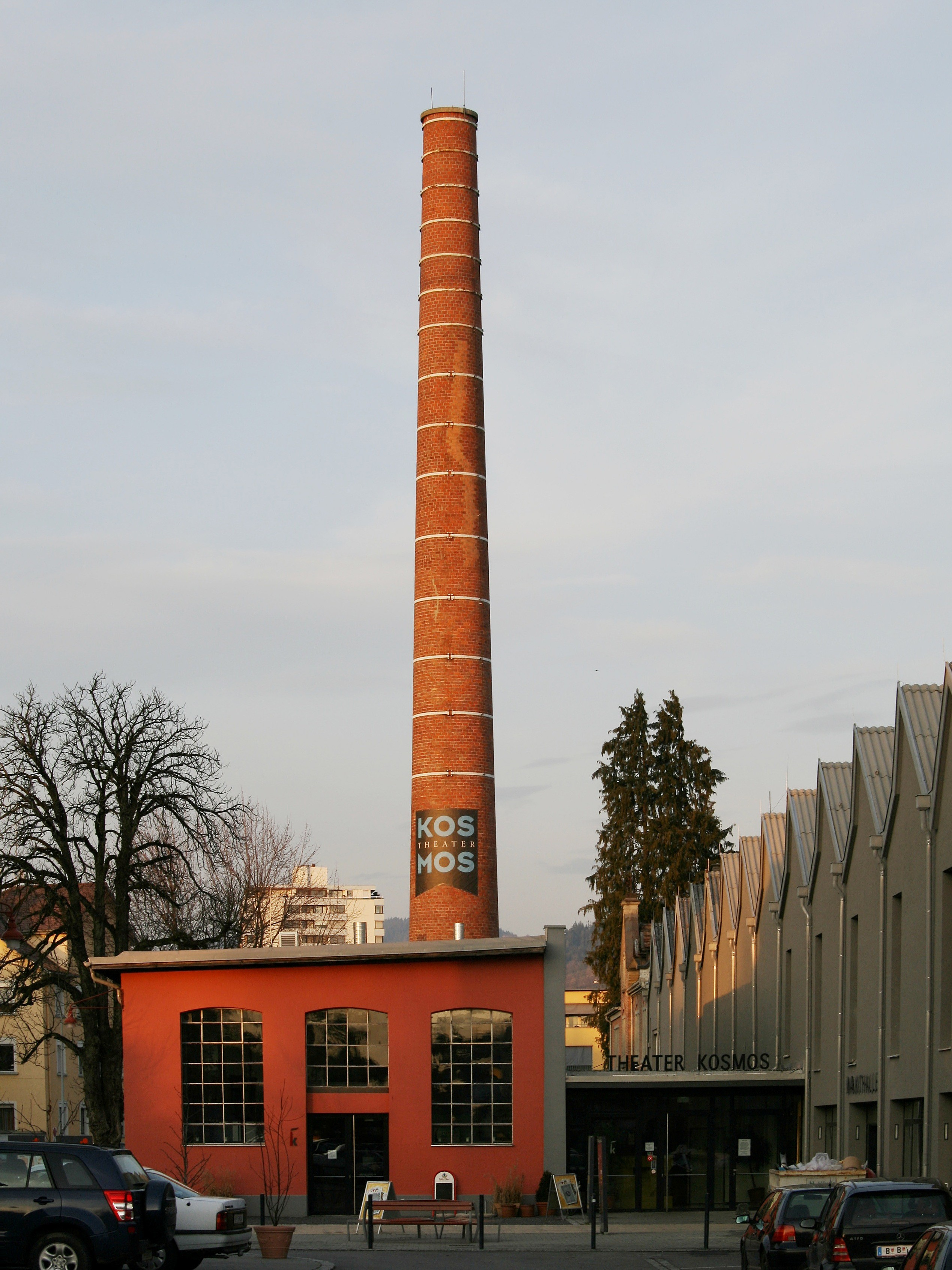 aus dem DEHIO Vorarlberg 1983: Mariahilfstrasse (Vorkloster) Nr. 27,29,31: Fabrik. Verwaltungsgebäude 2 geschossig, Klinker, zwei Zwerchgiebel (1897); Rückseitig Nr.27 *** im Schöllerareal in Bregenz, Vorarlberg.